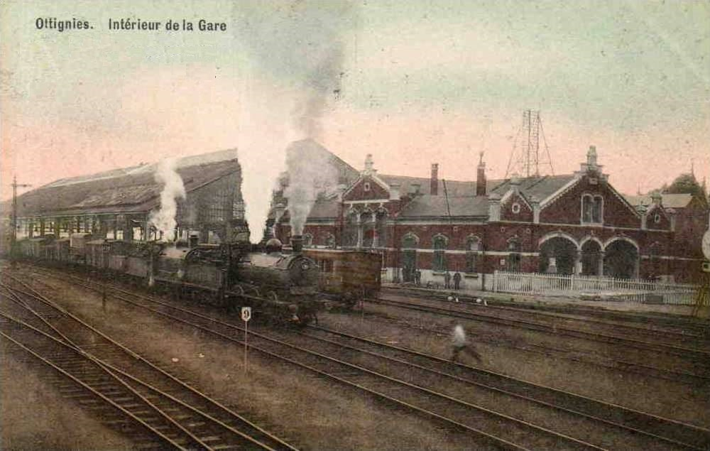 La Gare d'Ottignies en 1910 : le bâtiment des passagers, les voies, un locomotive à vapeur. En couleur. (Belgique)